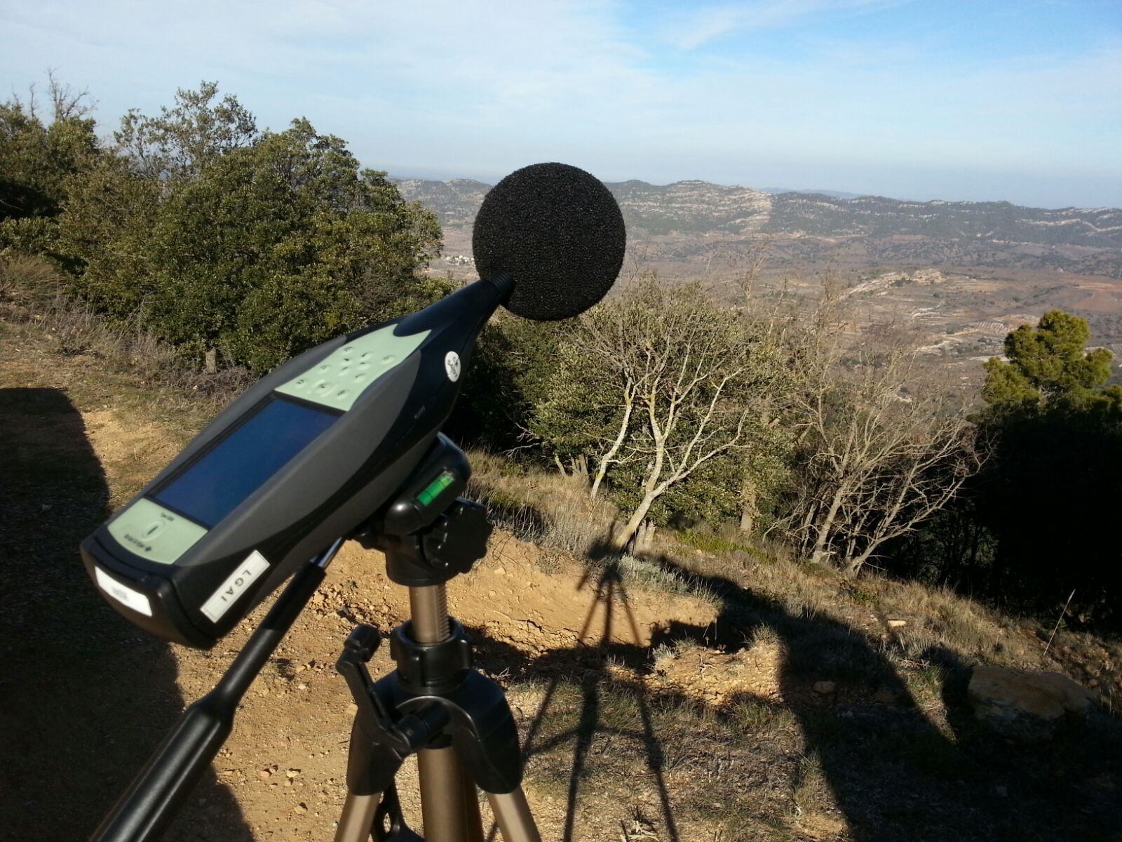 Mesurament de la qualitat acústica del Montsant. Soroll